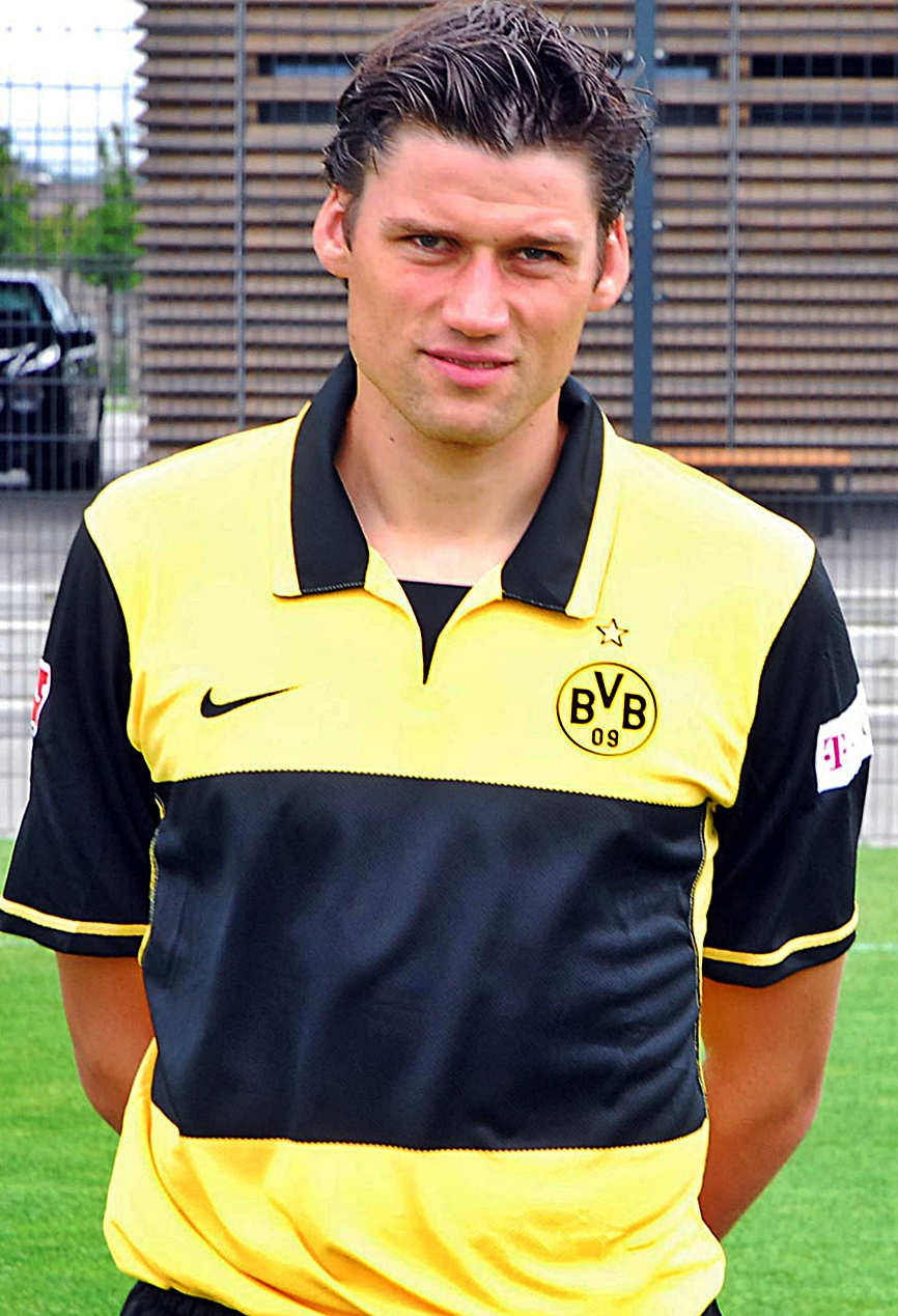 G. Federico bei der Mannschaftsvorstellung